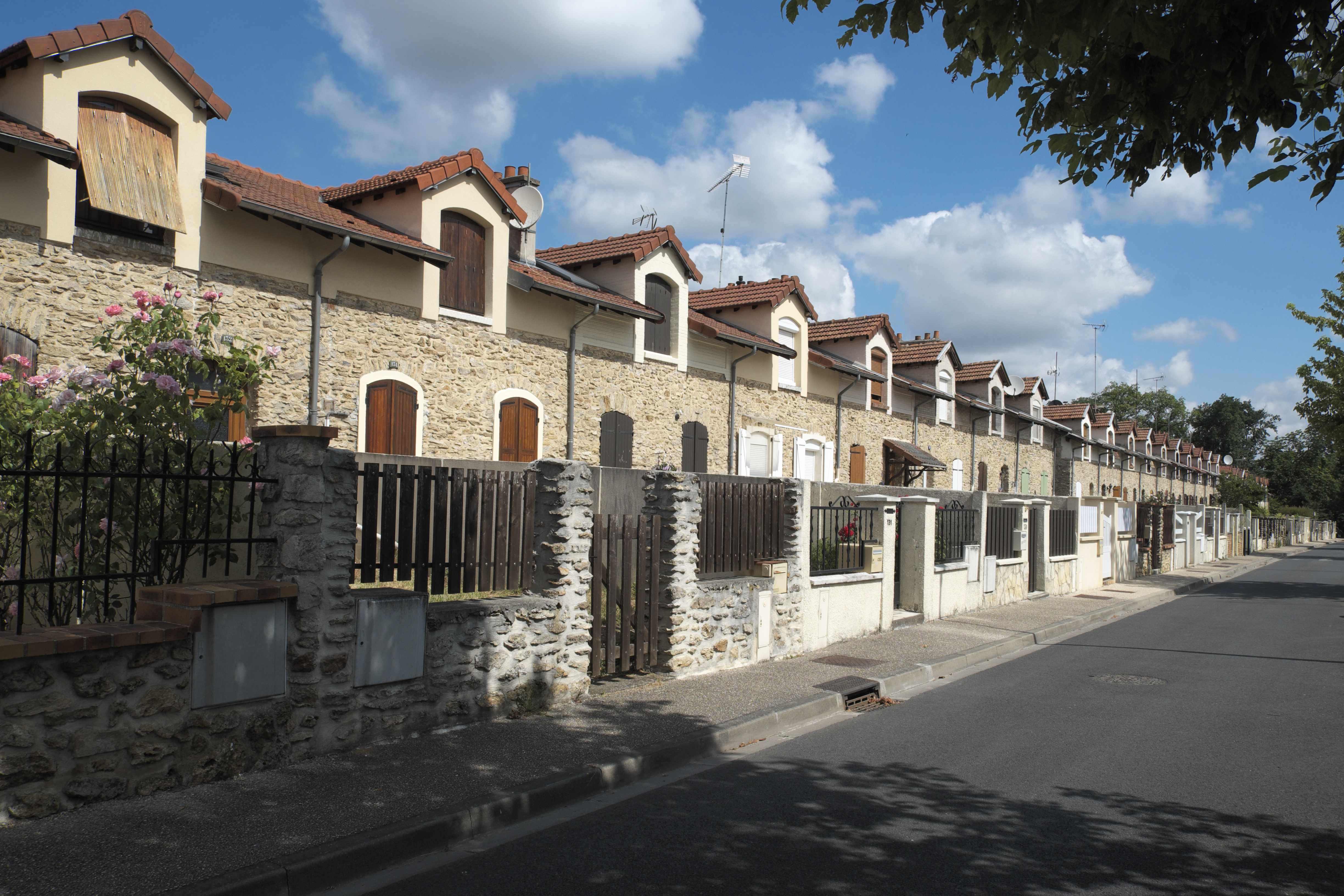 Arbeitersiedlung Cité Leroy, Rue Jacques Brel, in Saint-Fargeau-Ponthierry im Département Seine-et-Marne (Region Île-de-France/Frankreich)